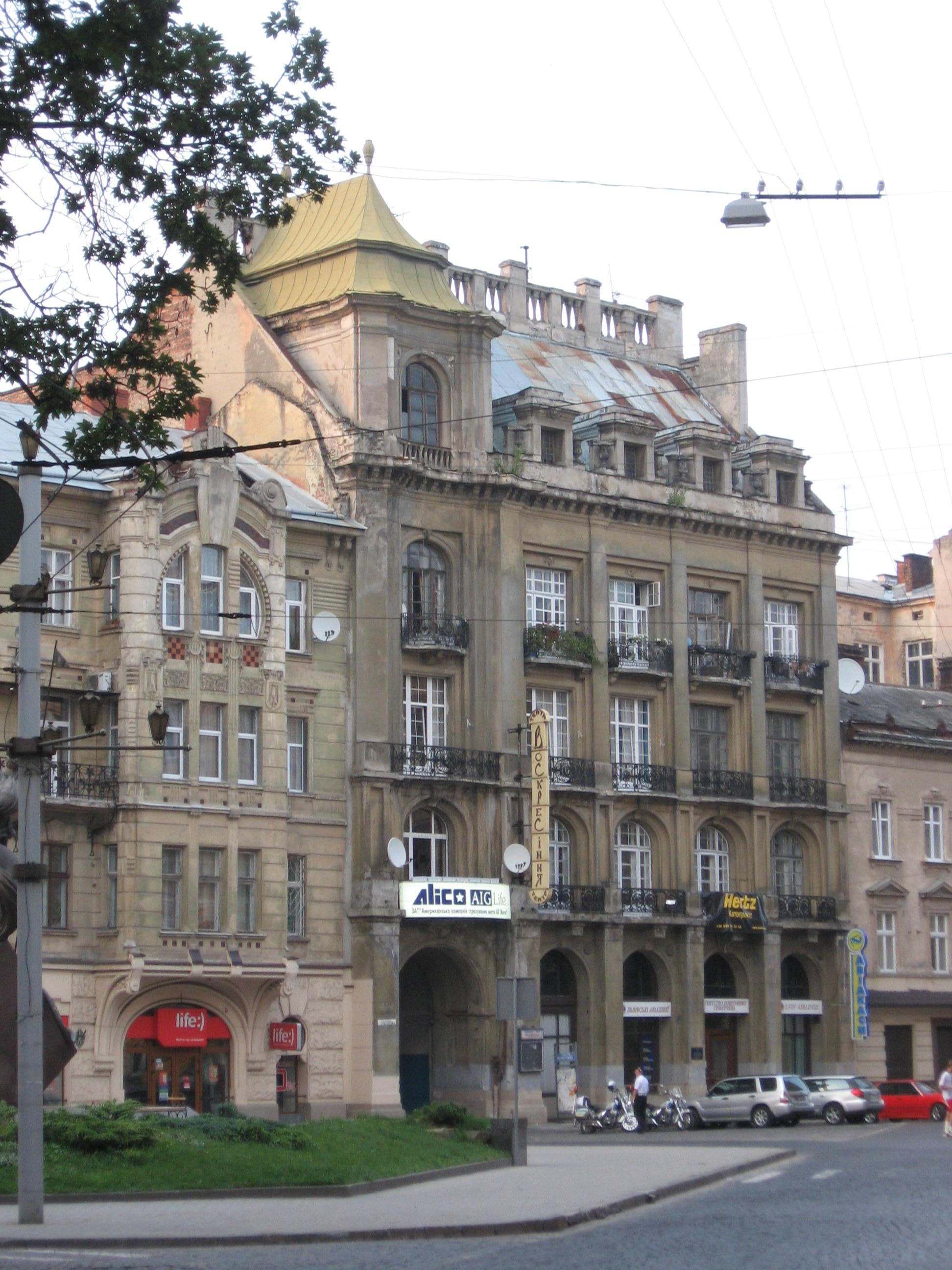 Театр имени Воскресенье Во Львове. Занимает первый этаж.